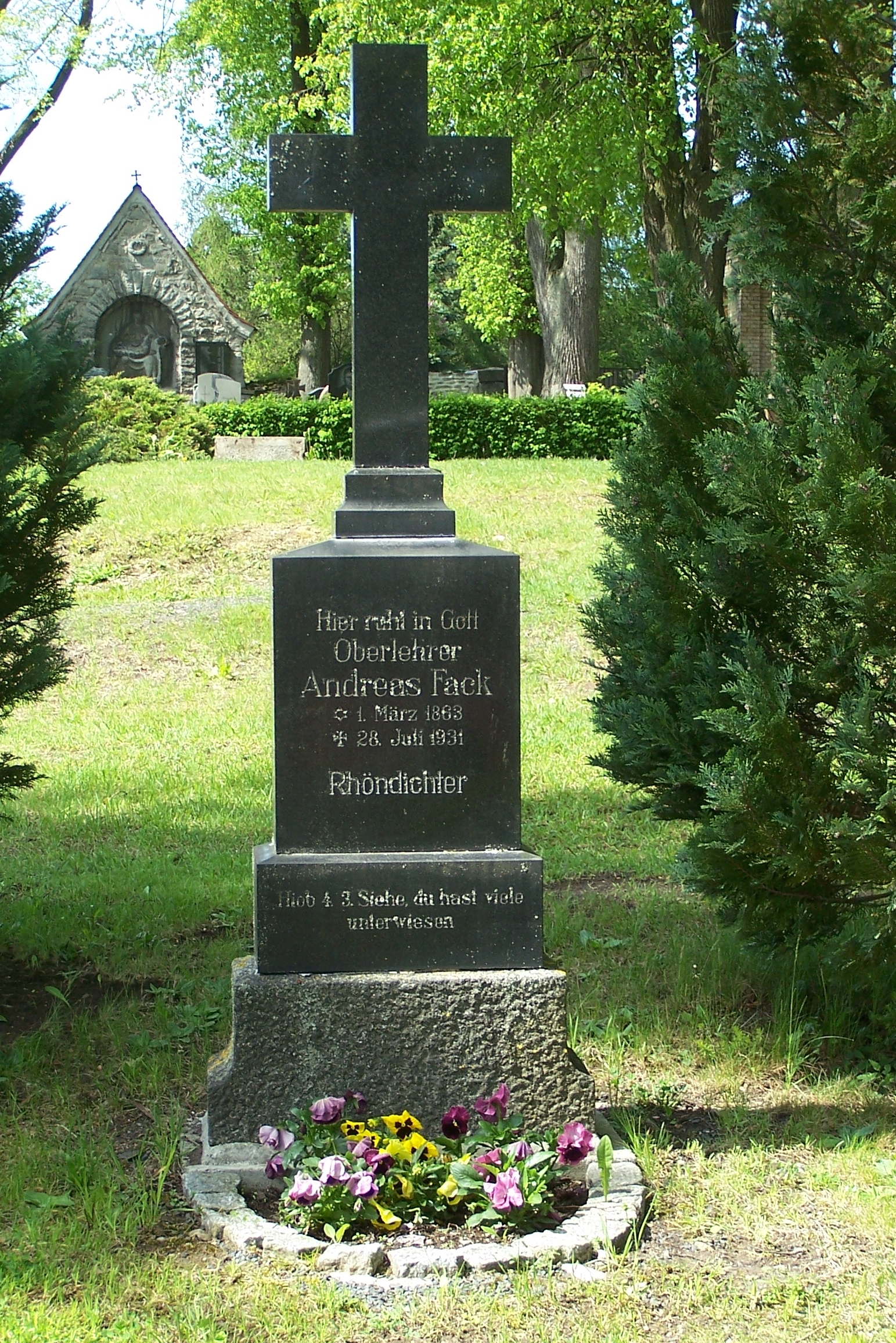 Grabdenkmal des Andreas Fack - bekannt als Rhöndichter - auf dem Friedhof in Kaltennordheim.